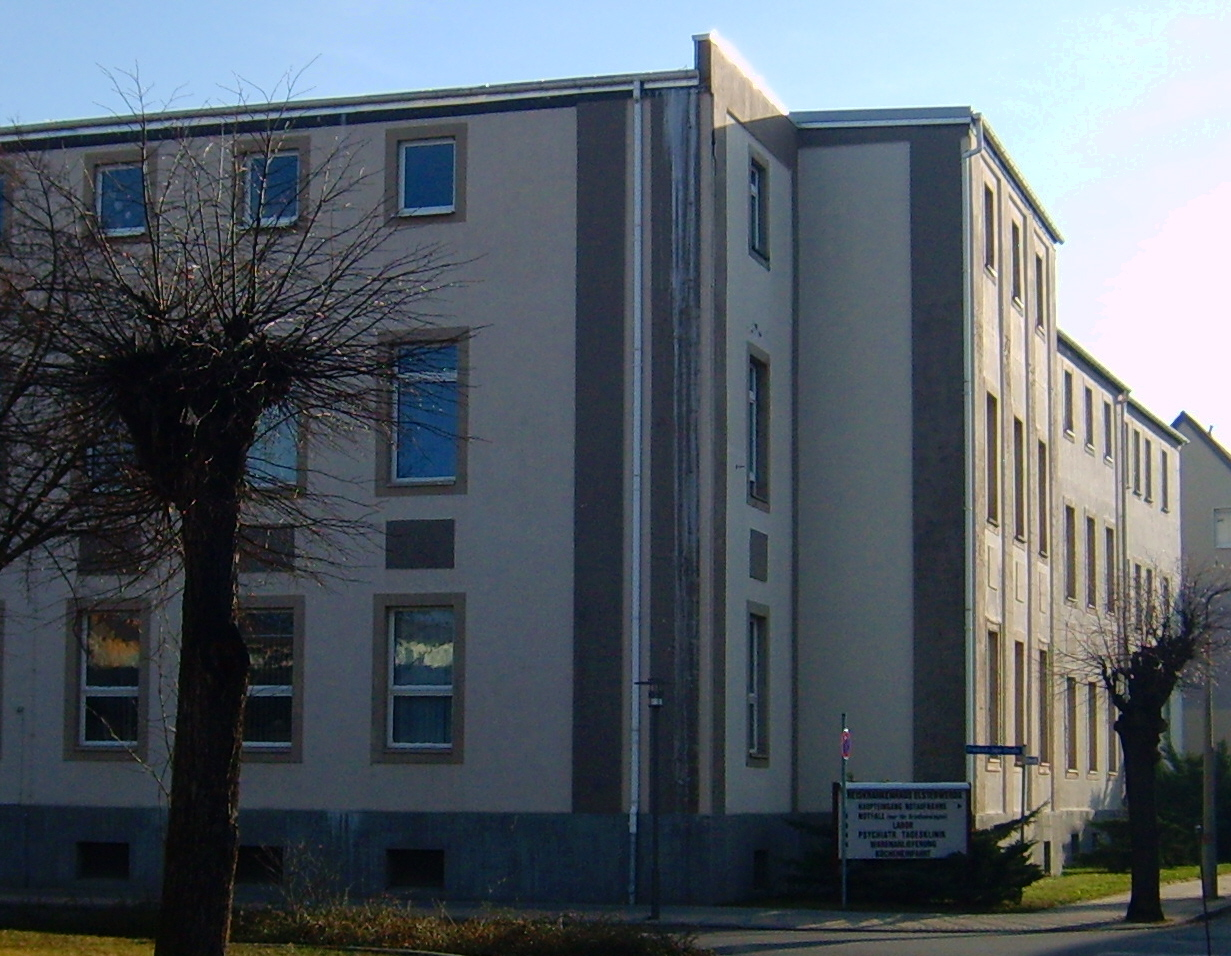 Ehemligen Amtsgericht und heutiges Krankenhaus in Elsterwerda